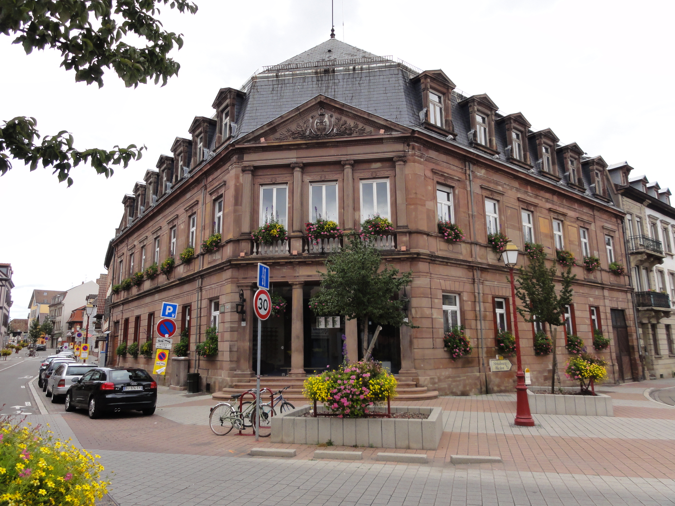 Alsace, Bas-Rhin, Schiltigheim, Ancienne mairie (1877), 57 rue Principale. .